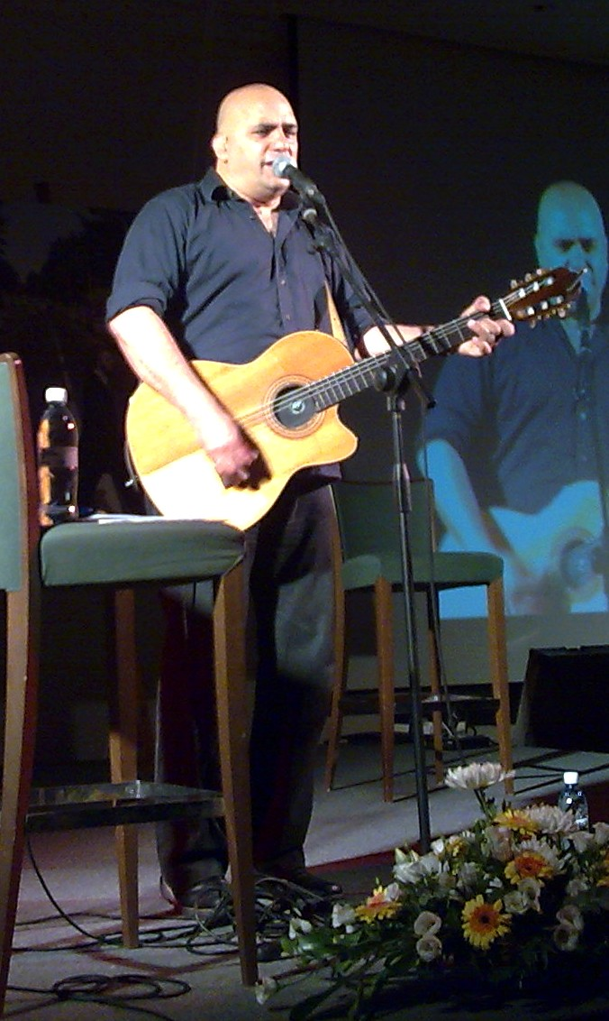 דני רובס בהופעה רישיון נוצר על ידי אלי שני